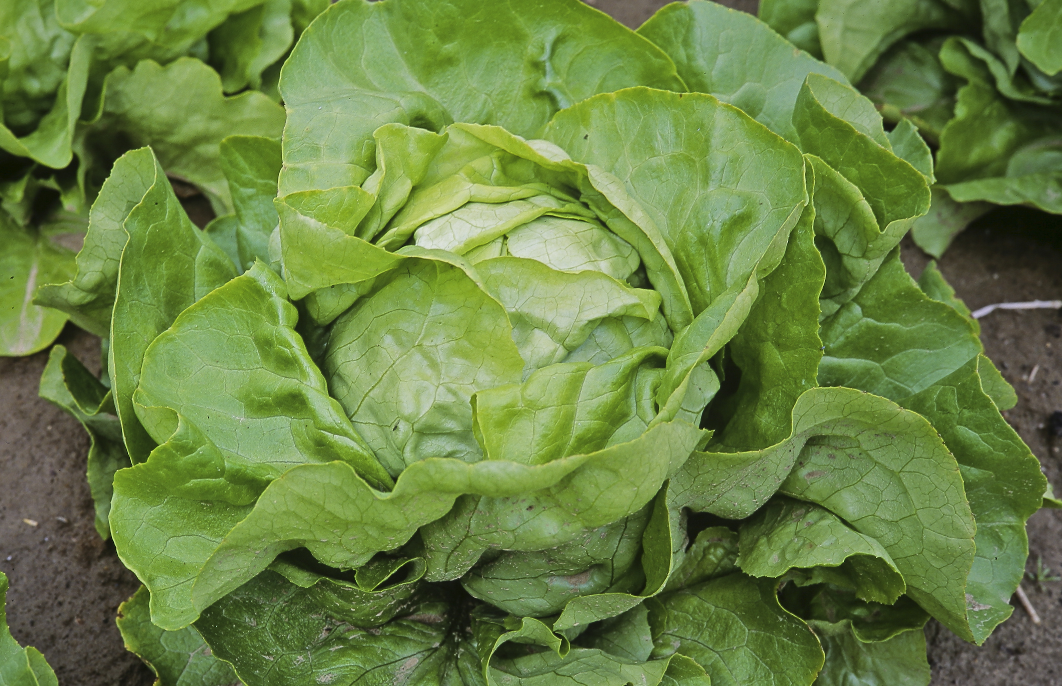 INRA, Jean Weber